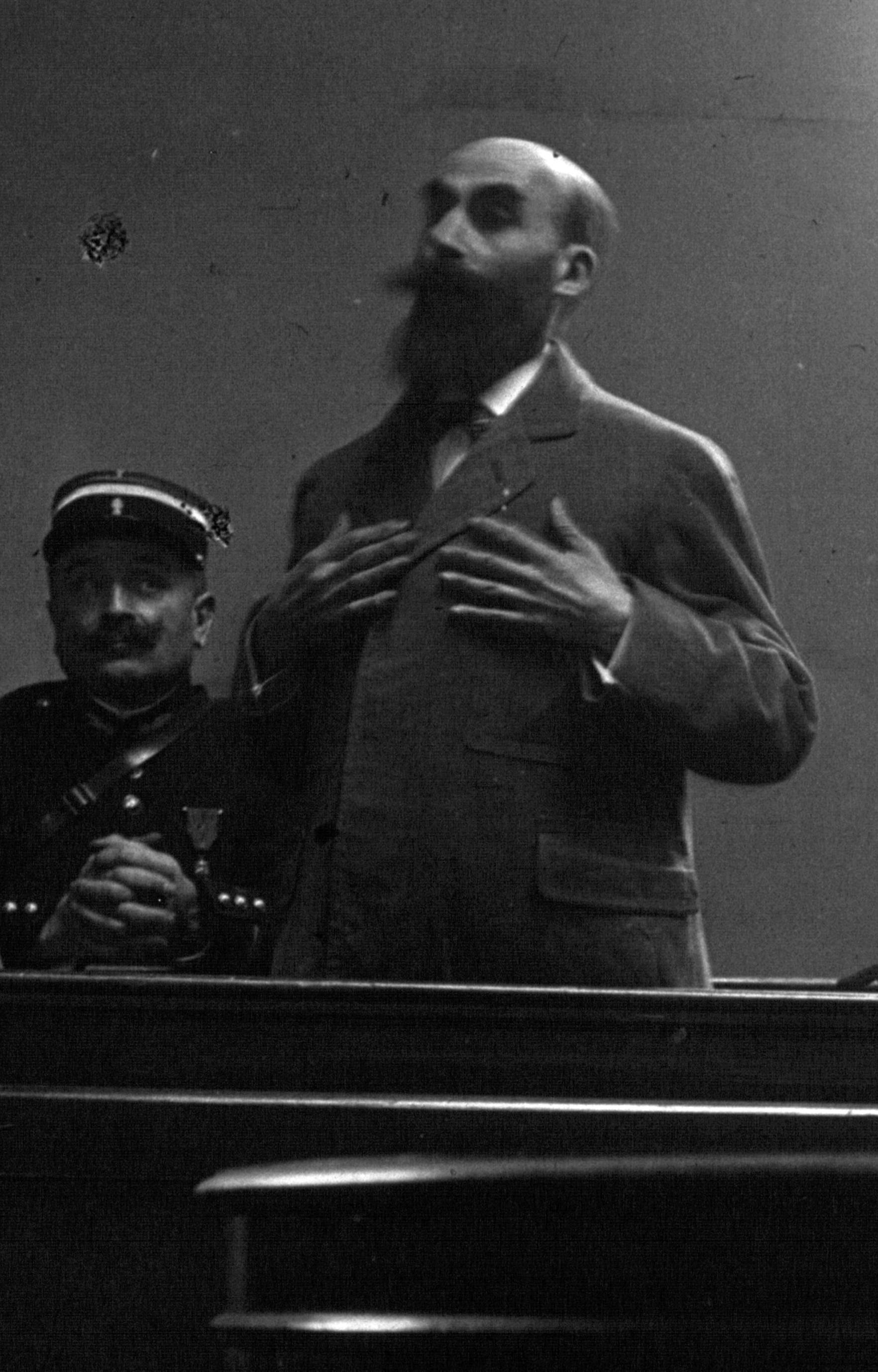 Landru à son procès